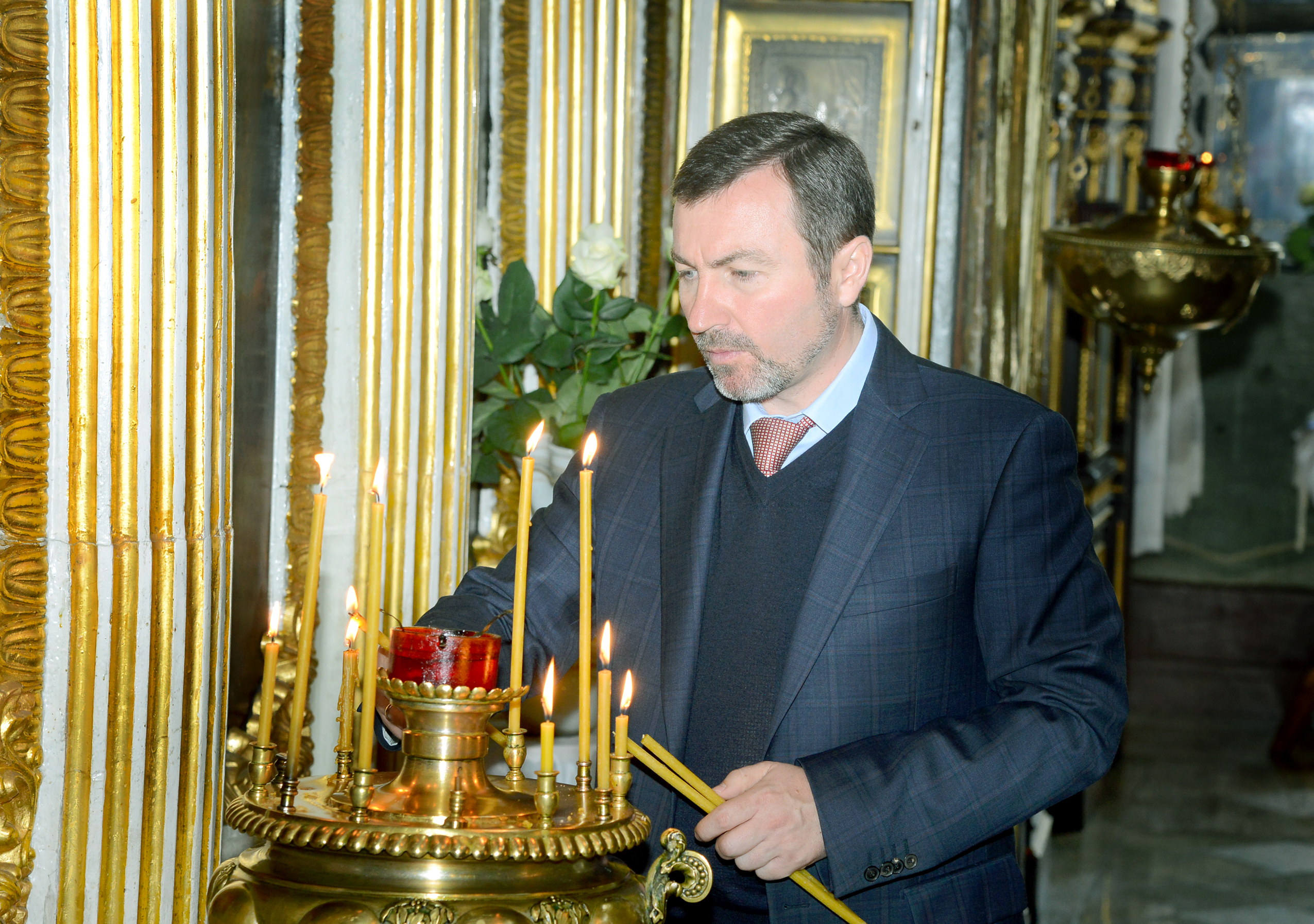 г. Днепр , фото Вадим Чуприна